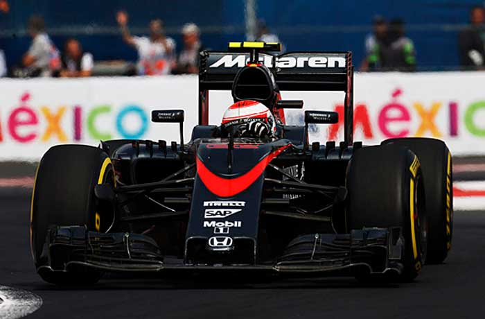 Jenson Button GP Mexico 2015